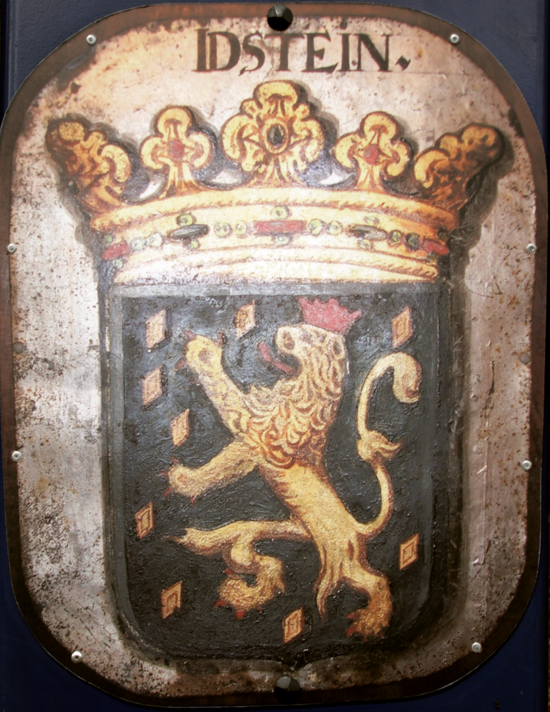 Reproduktion des Hoheitsschilds am Bechtheimer Schlag bei Hünstetten-Bechtheim, Deutschland